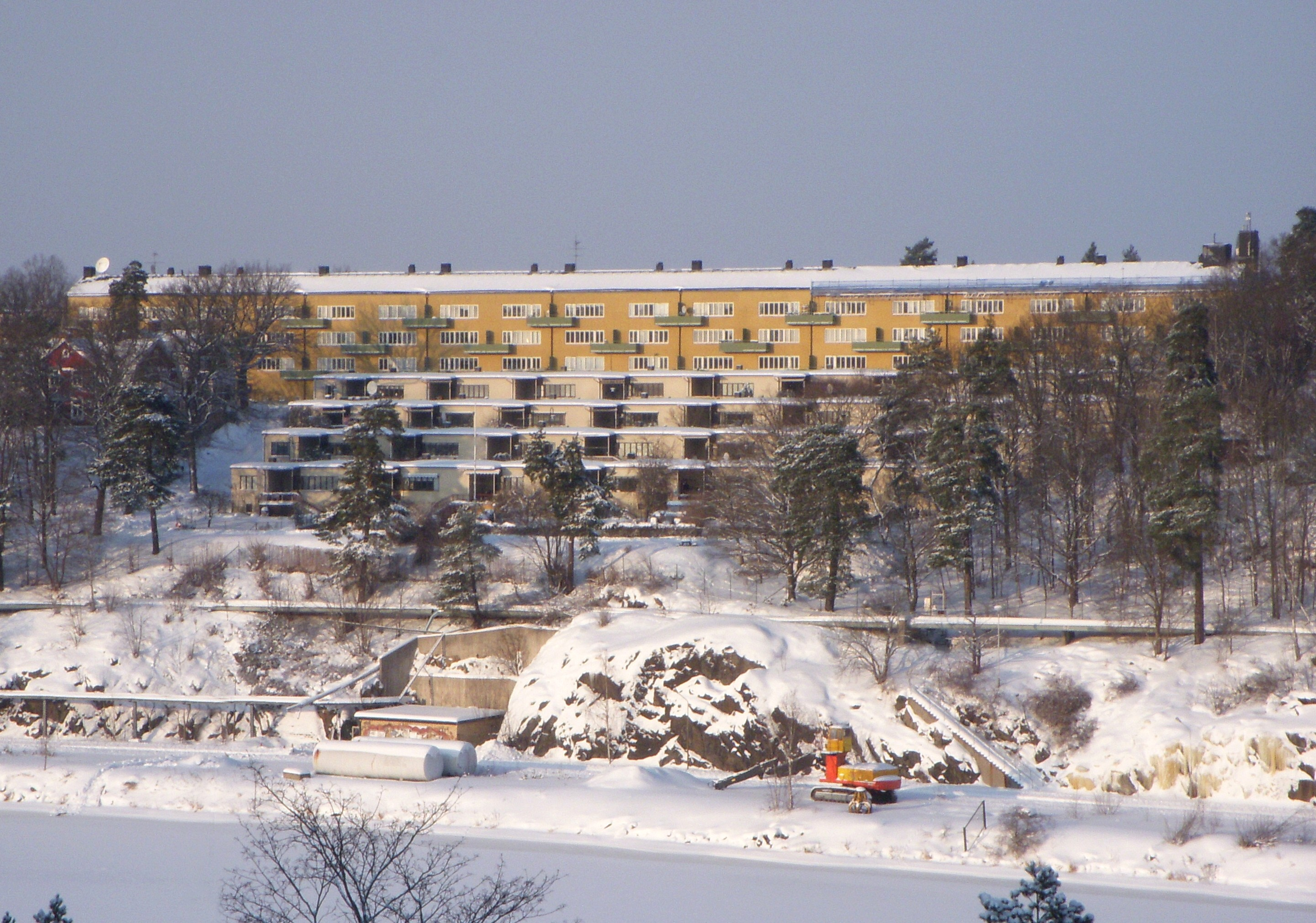 Radhusen på Kvarnholmen, Nacka